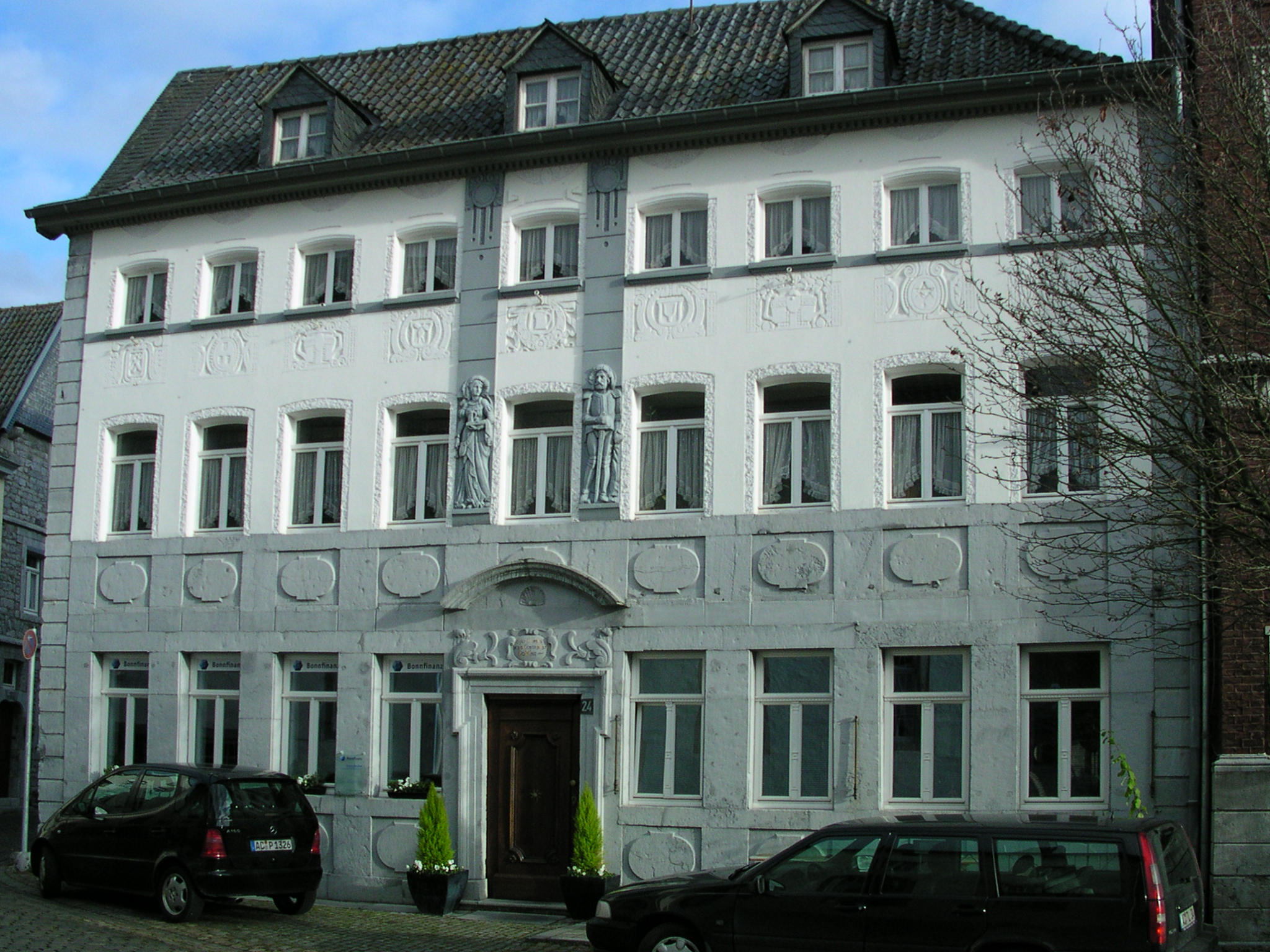 großes Steinhaus in Aachen-Kornelimünster, Benediktusplatz 24